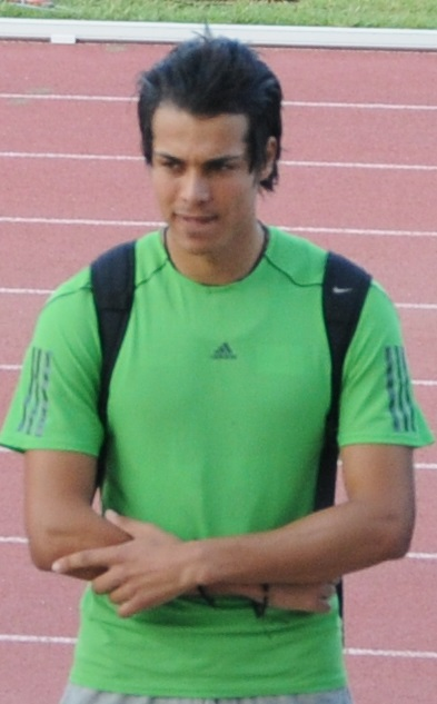 Mohamed Sghaier au 1er meeting de Tunis en juin 2012